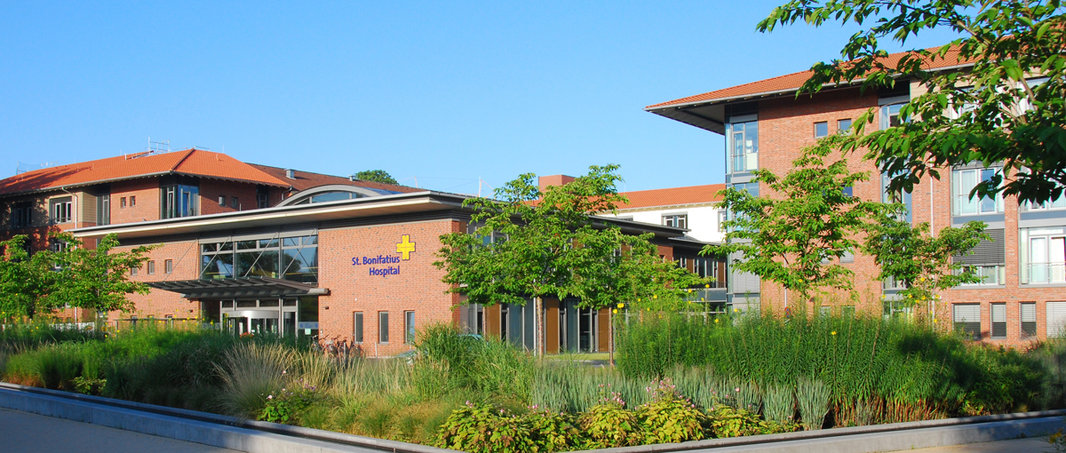 Frontansicht des Neubaus